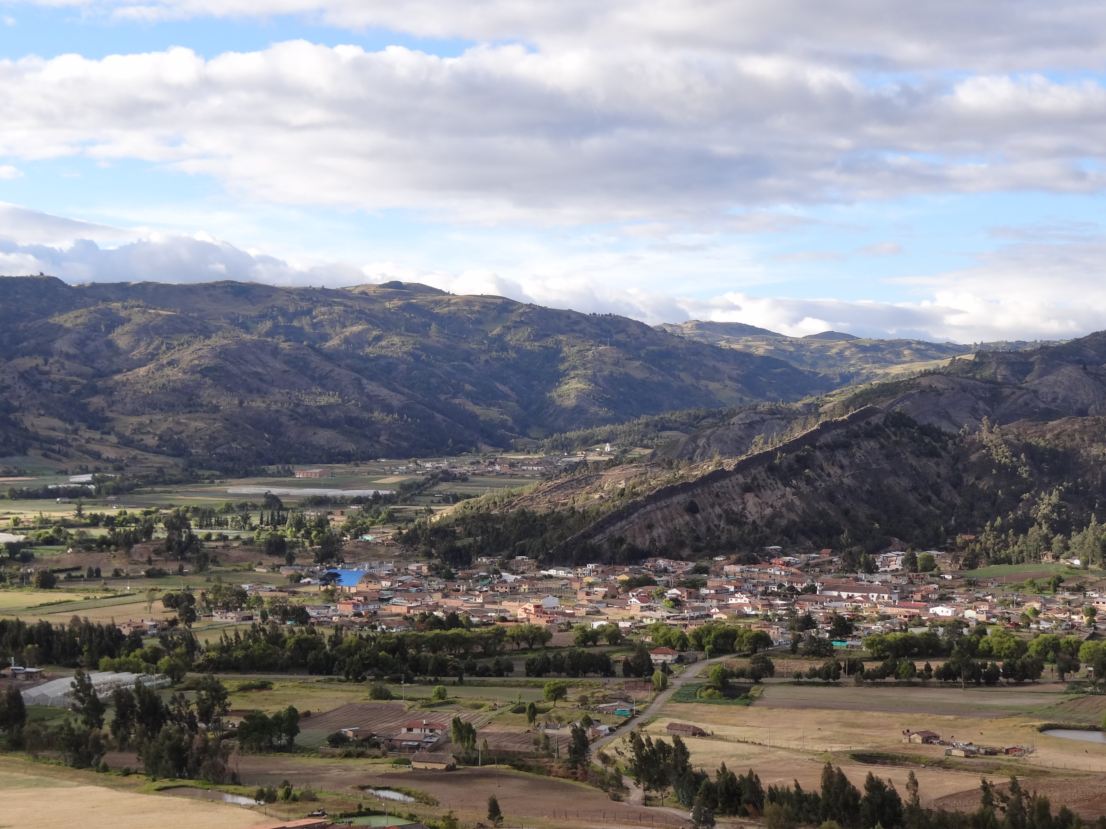 Detalle del área urbana del municipio de Cucaita, departamento de Boyacá, Colombia, al fondo área urbana del municipio de Sora